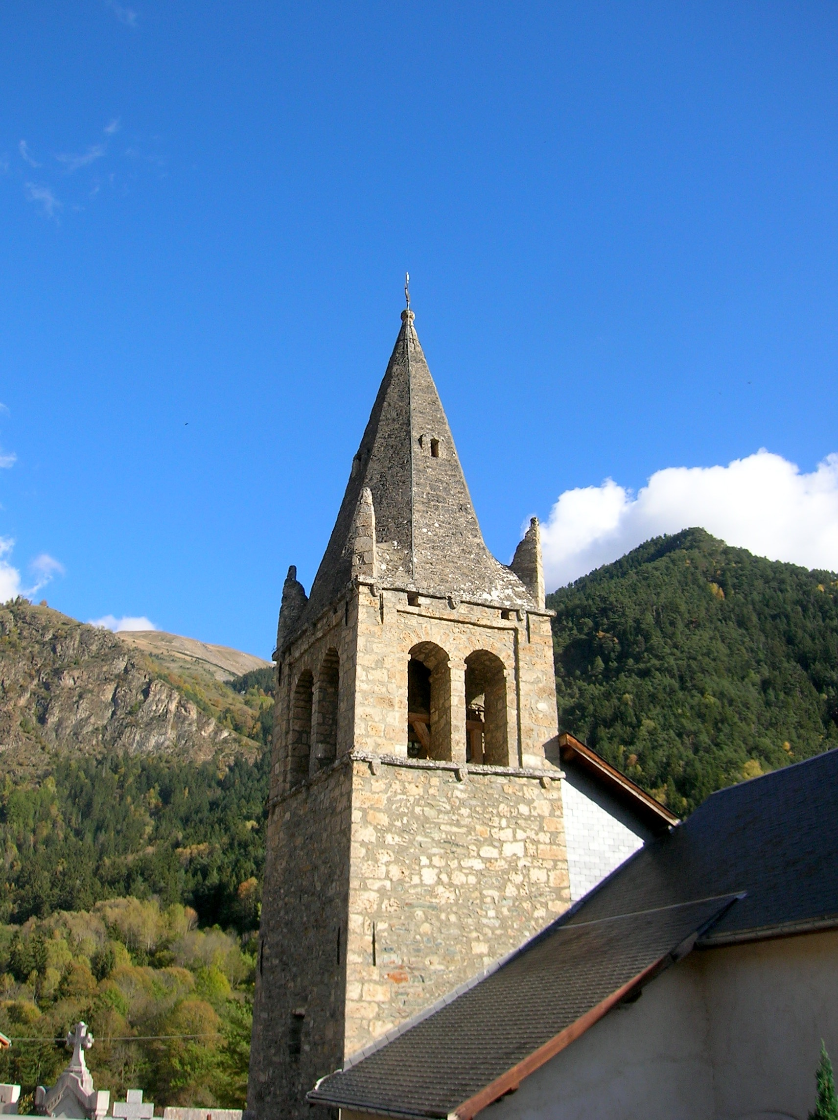 Église Saint-Pierre de La Garde-en-Oisans. La Garde (Isère), AuRA, France.